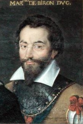 Portrait de Charles de Gontaut-Biron.